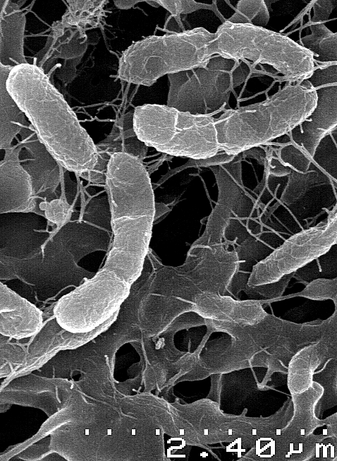 author: Adrian Hetzer